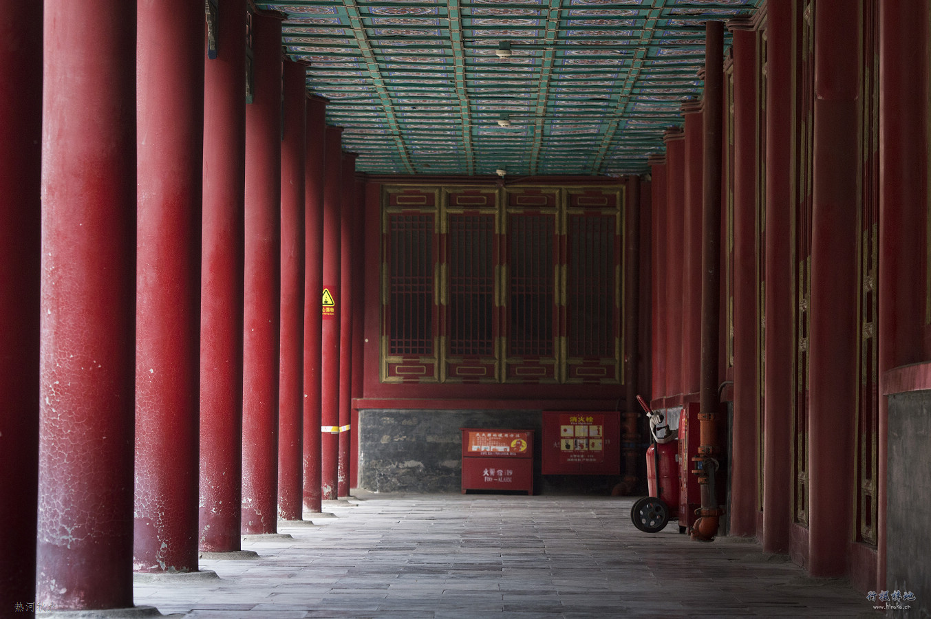 中文（中国大陆）: 红台五层南侧 “秘密胜境”的廊柱